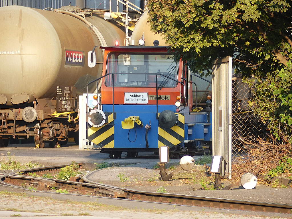 Allrad DH90, Mainz/Weisenau, ADM Soya Mainz GmbH, 04.10.2014